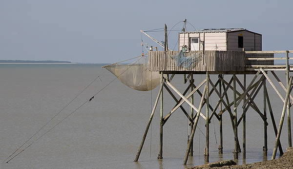 Carrelet de l'île Madame - Charente-Maritime Photo issue de ma banque d'images : Pep.per 15 octobre 2006 à 20:32 (CEST)